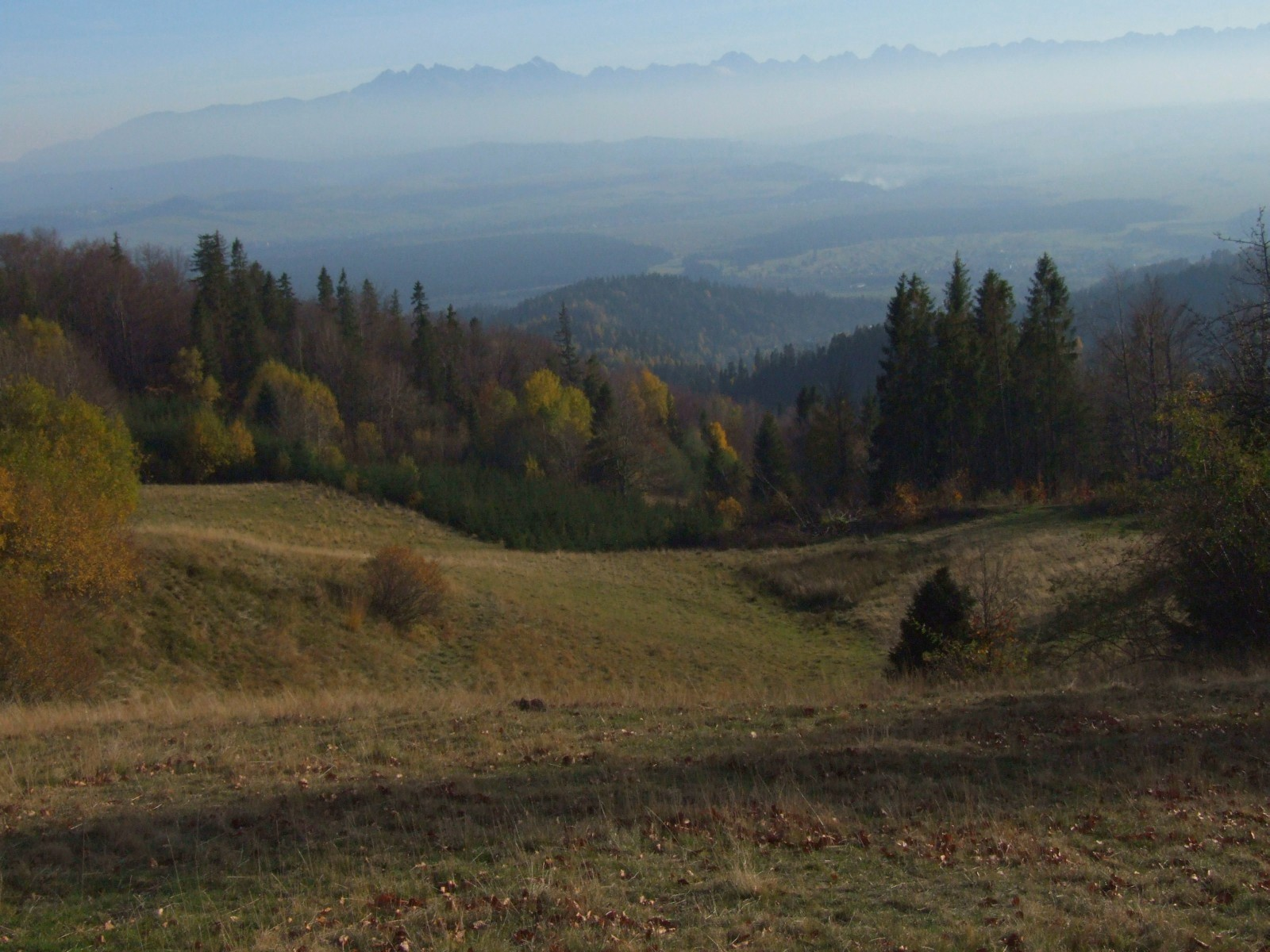 Widok na Tatry z polany Srokówki w Gorcach pod Wysznią